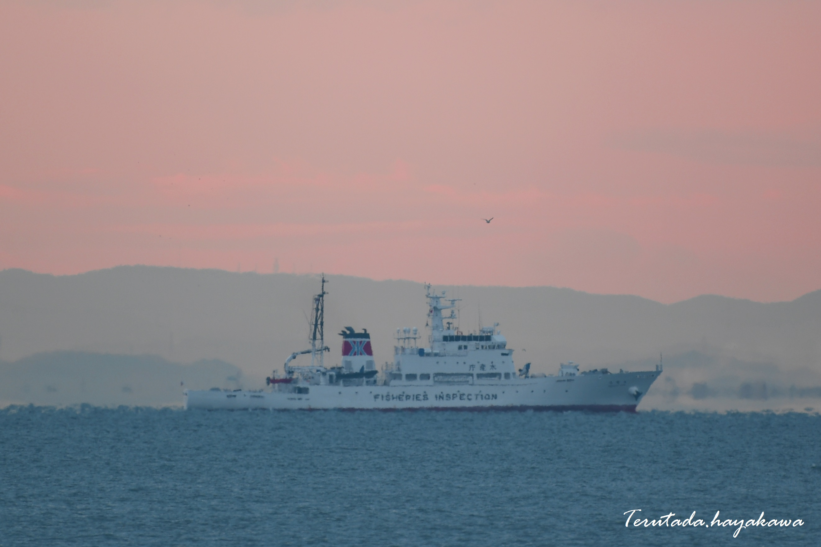 朝焼けの東京湾を航行する白竜丸